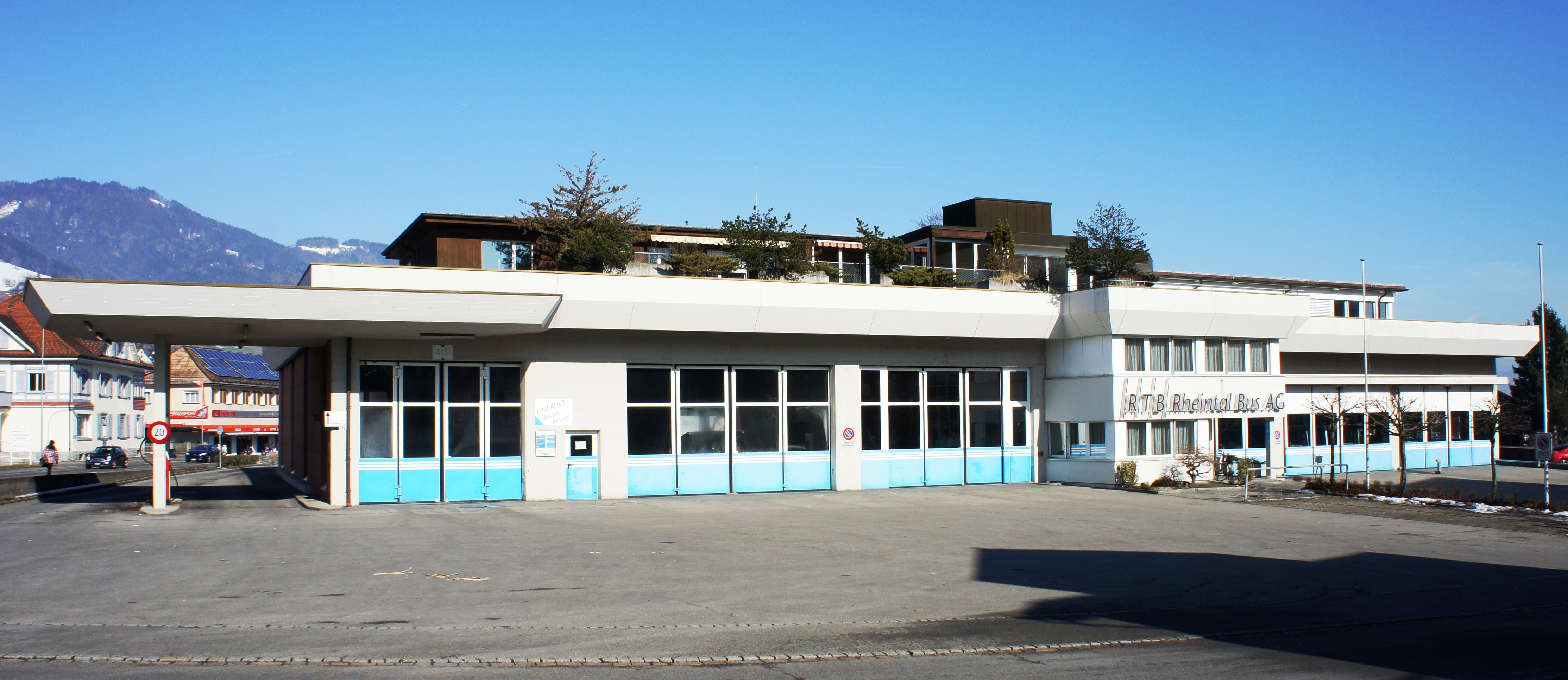 Hauptgebäude (Verwaltung und Depot) der RTB in Altstätten.